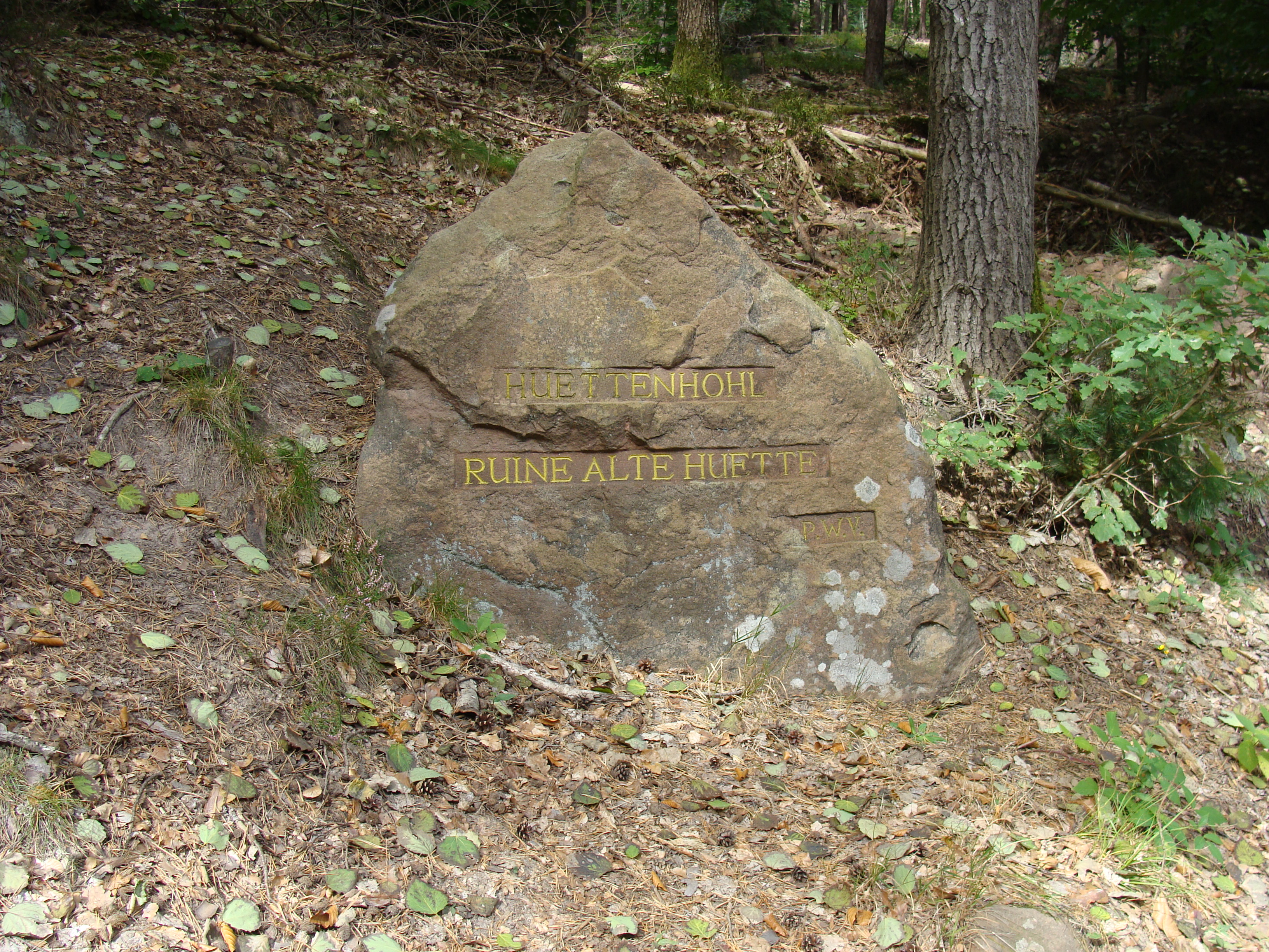 Ritterstein 239 Hüttenhohl - Ruine Alte Hütte